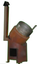 Грибоварочный котел с железной топкой